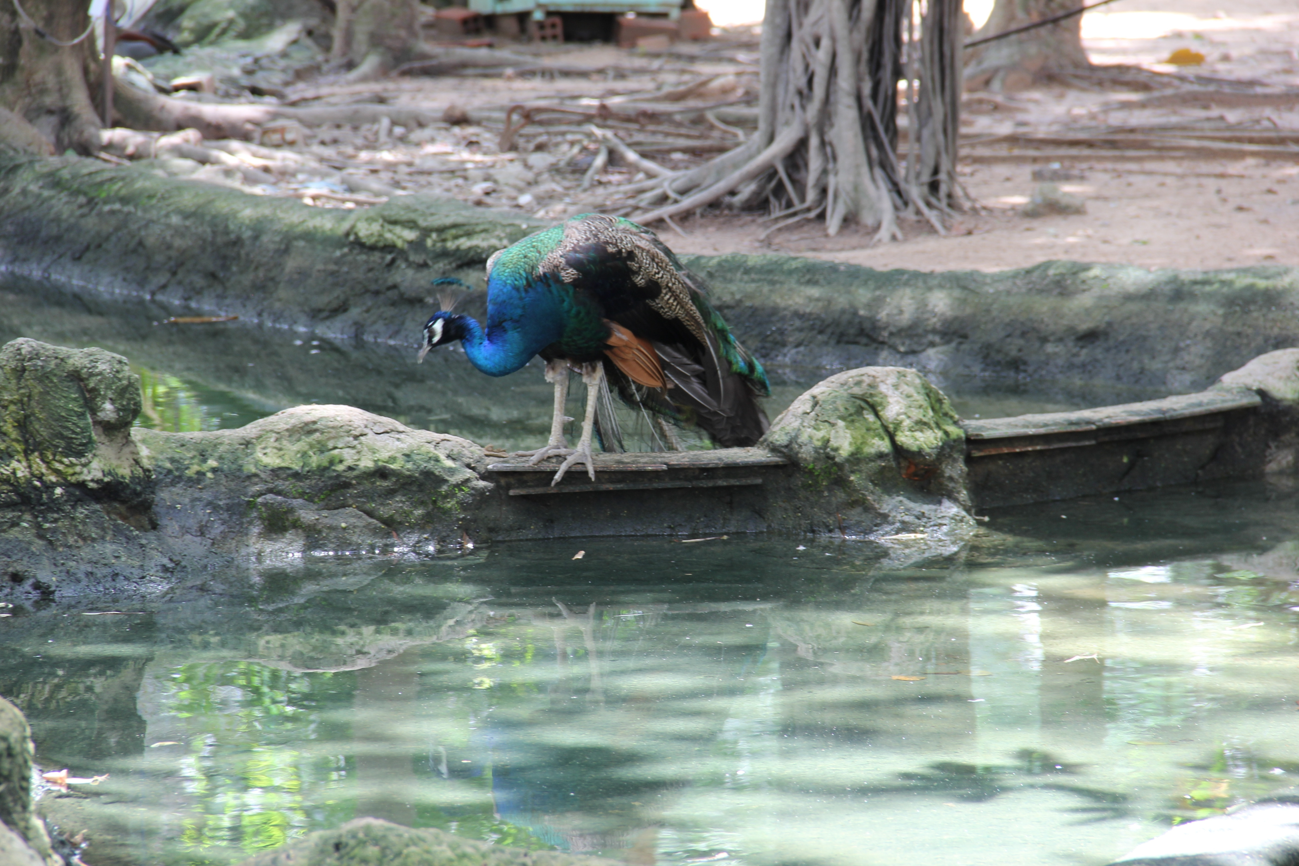 Hình tự chụp bằng máy ảnh kỷ thuật số về một con công ở Đại Nam